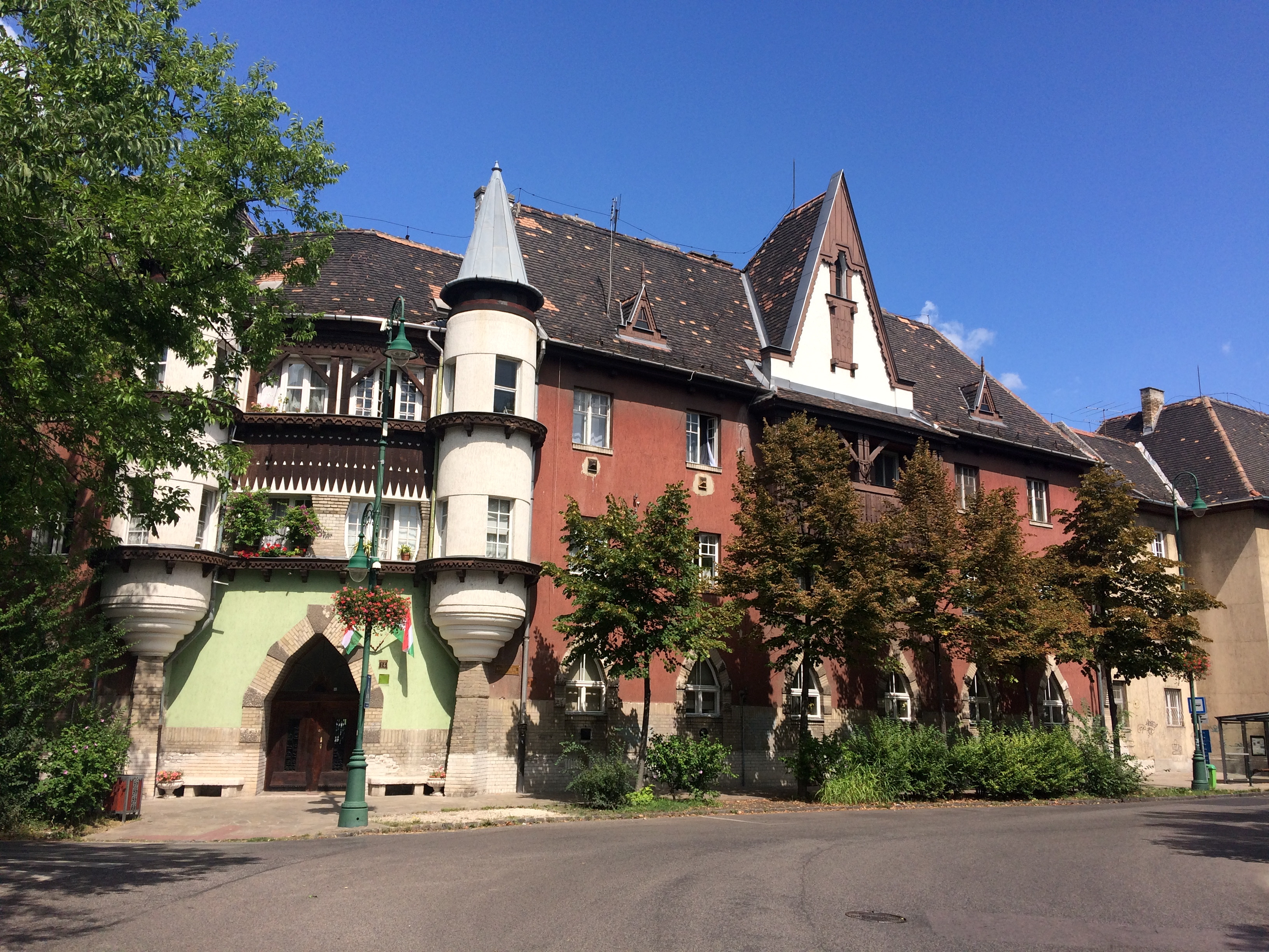 Budapest Kispest Kós Károly tér architektura dzielnicy charakterystyczna zabudowa historyczna